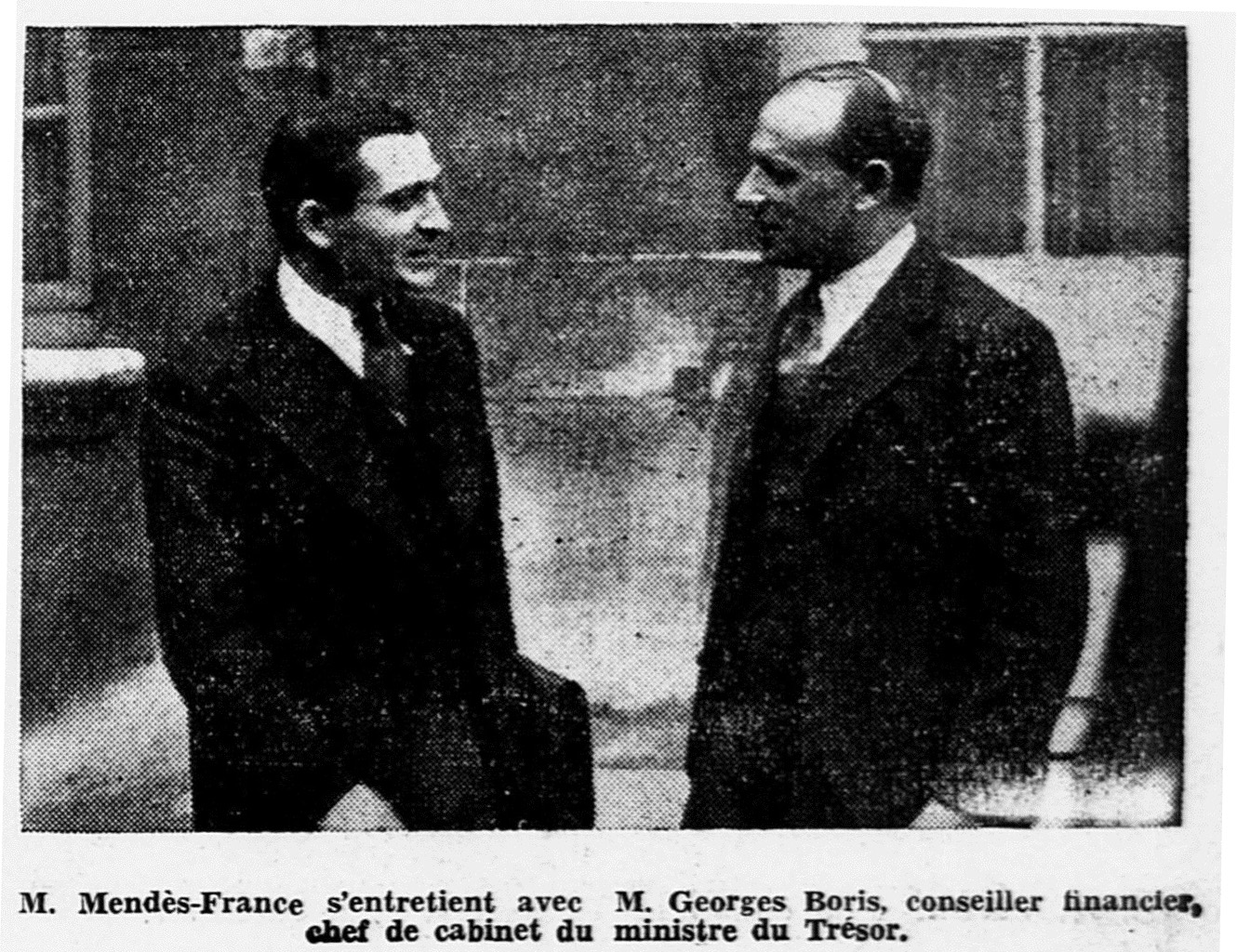 Pierre Mendès France et Georges Boris en avril 1938, lors du second gouvernement Léon Blum. Une du journal L'Ouest-Éclair (n° 15123) du 6 avril 1938.